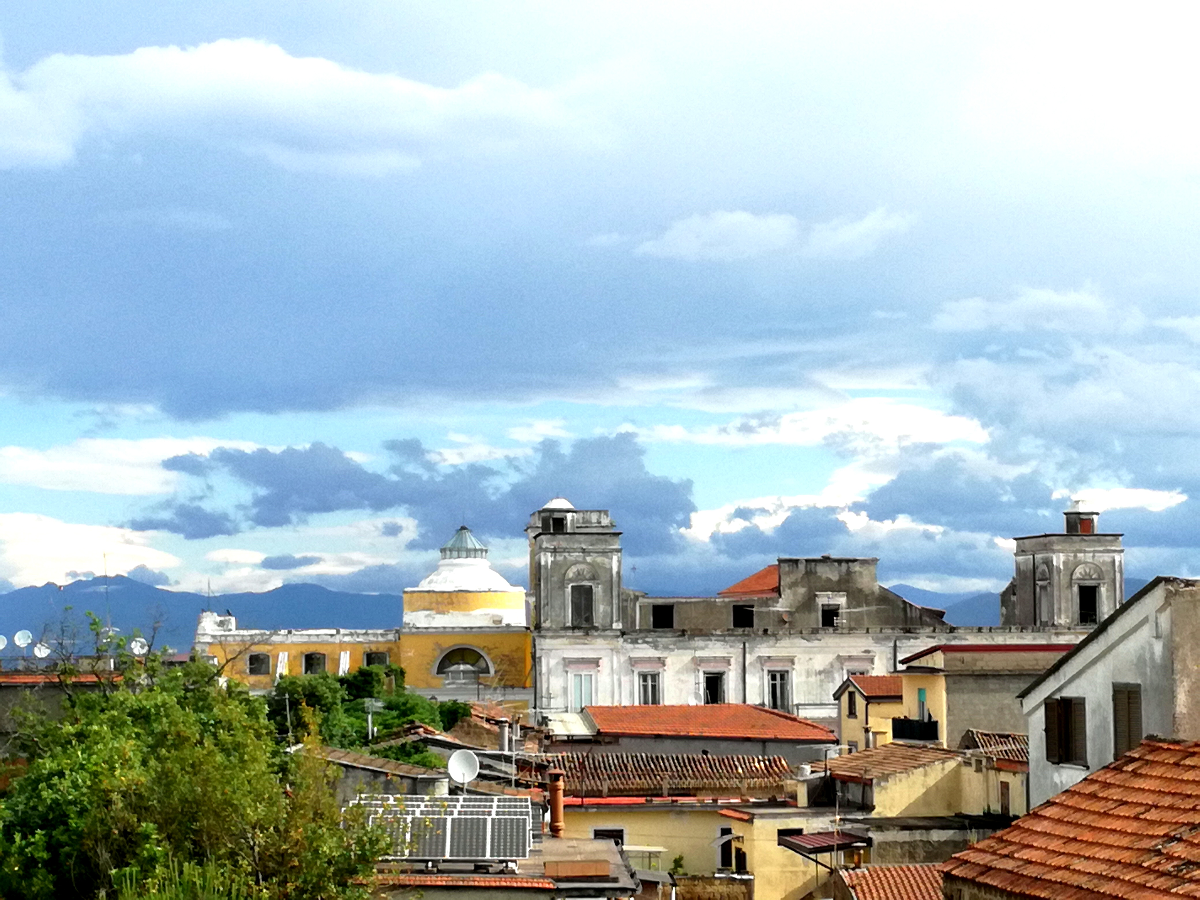 Veduta del paese di Cesa (Caserta)